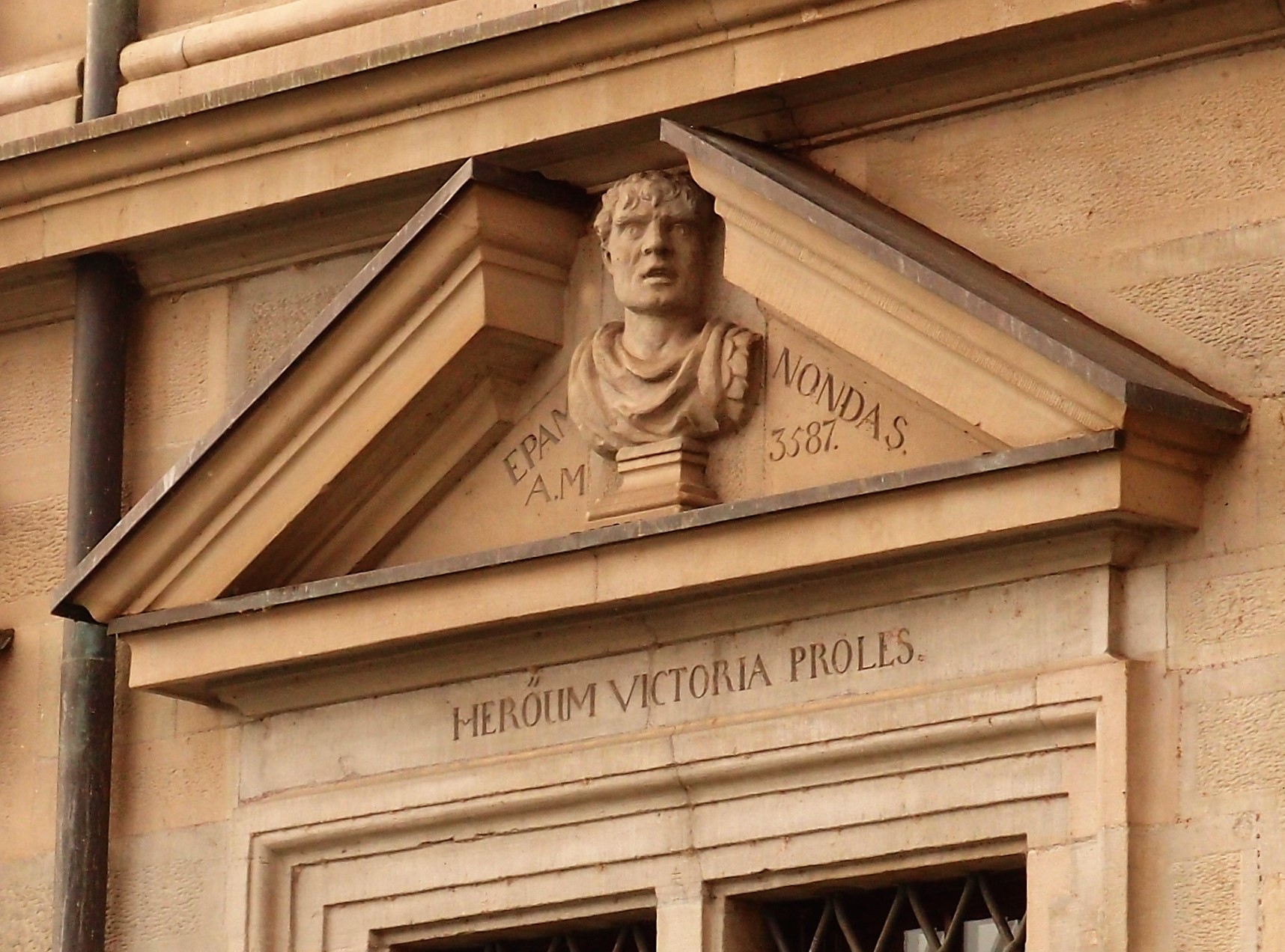 Büste des griechischen Staatsmanns und Feldherrn Epaminondas (um 418-362 v. Chr.) an der Südfassade des Rathauses von Zürich